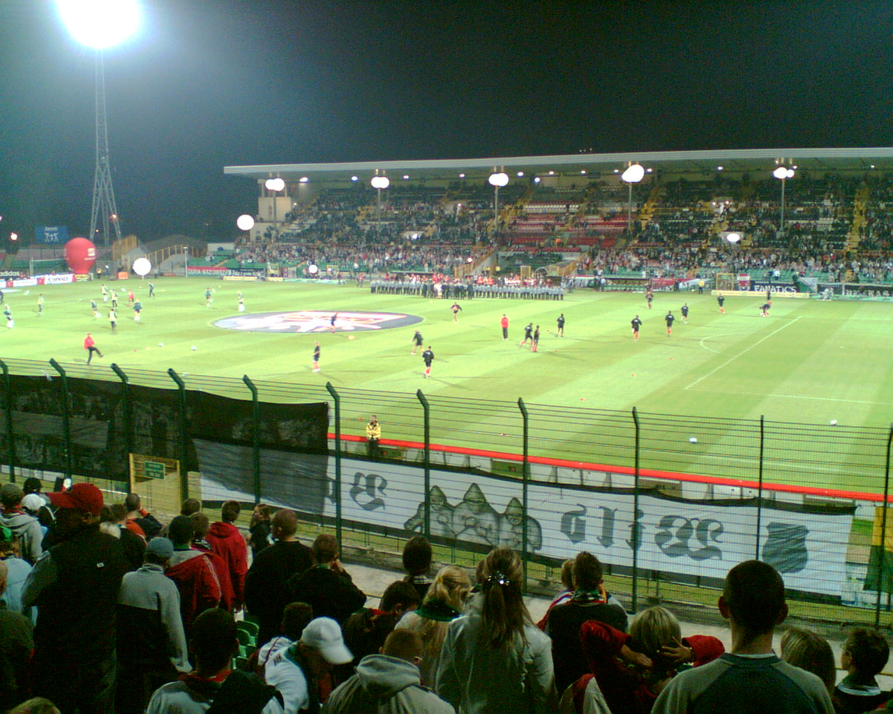 Mecz piłkarski Legia - Polonia 1:0, Derby Warszawy 2005